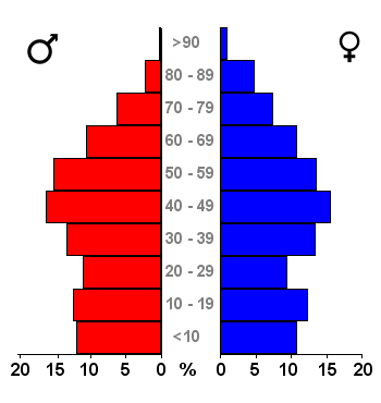 Age pyramids for the 443 municipalities in the Netherlands. Data 2007. Statistics provided by Centraal Bureau voor de Statistiek, Voorburg/Heerlen. Source: Tabel: Bevolking Nederland per gemeente en diverse regio's naar leeftijd, geslacht en burgerlijke staat, 1 januari 1988-2007. Gewijzigd op 24 mei 2007 (on-line database StatLine) Bevolkingspiramide - Gemeente Hillegom (2007).png